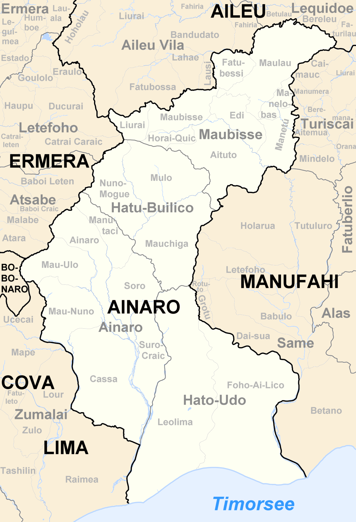 Sucos des Distrikts Ainaro/Osttimor nach der Neustrukturierung 2003, bis zur Gebietsreform 2015